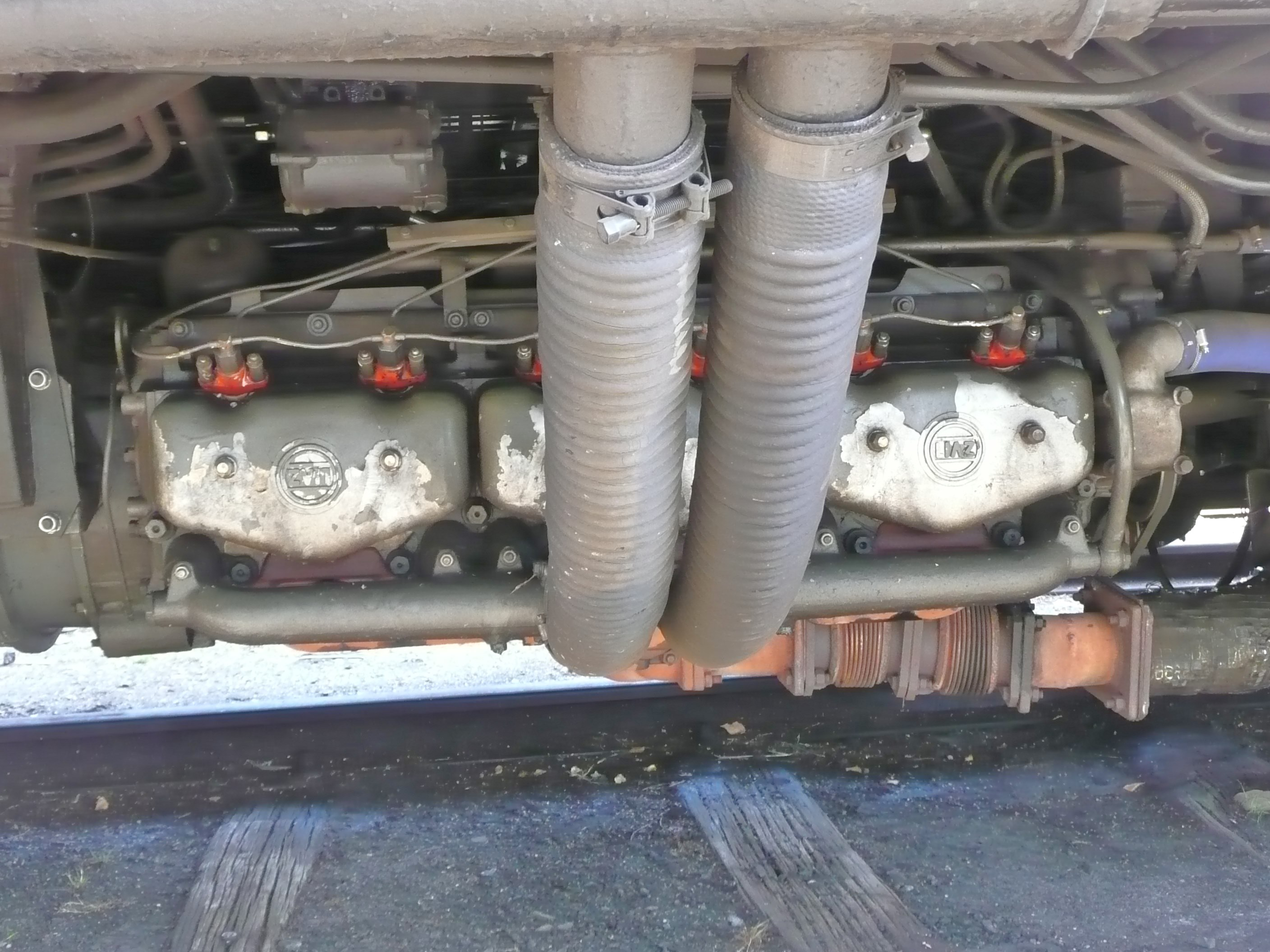 Antriebsmotor Marke LIAZ des M 152.0